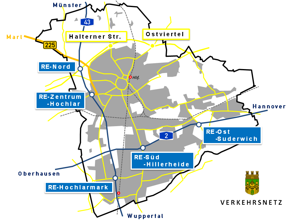 Verkehrsnetzkarte - Recklinghausen, Nordrhein-Westfalen, Deutschland